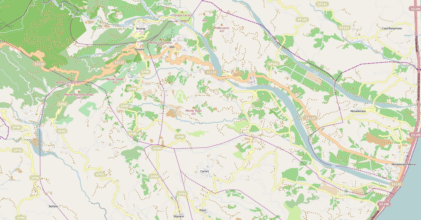 Vallata dello Stilaro OSM 04-01-2013